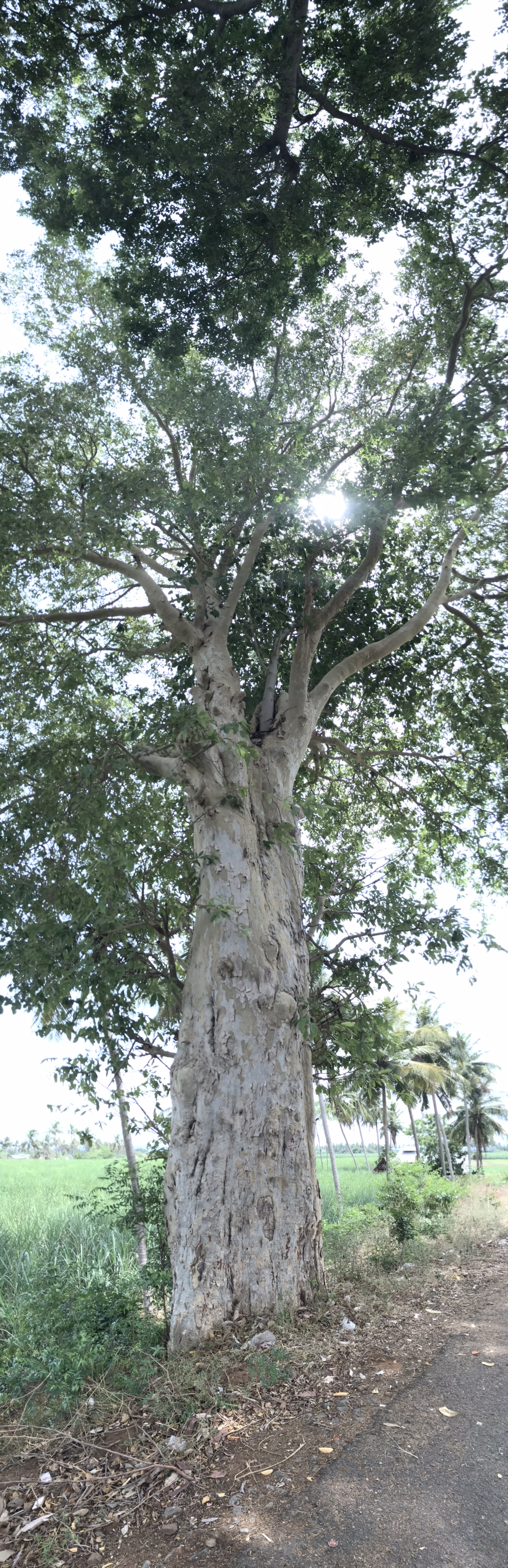 மதுரை மாவட்டம் அலங்காநல்லூர் அருகில் செம்புக்குடிபட்டி கிராமத்தின் வடக்கே, முல்லைப் பெரியாறு பிரதான கால்வாய் கறையில் உள்ள ஒரு மருதமரம்